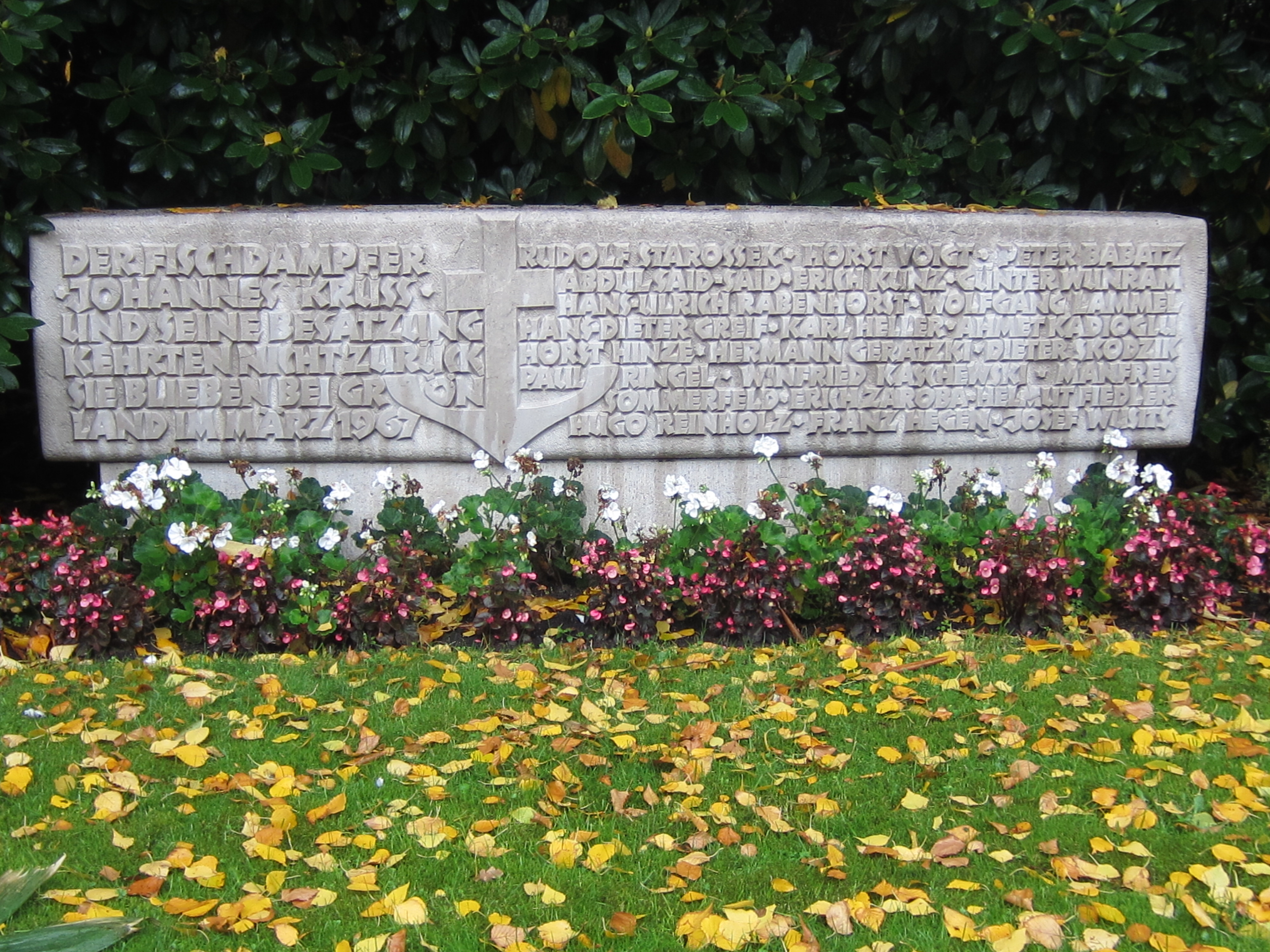 Gedenkstätte für die Besatzung des Fischdampfers Johannes Krüss auf dem Friedhof in Bremerhaven-Geestemünde